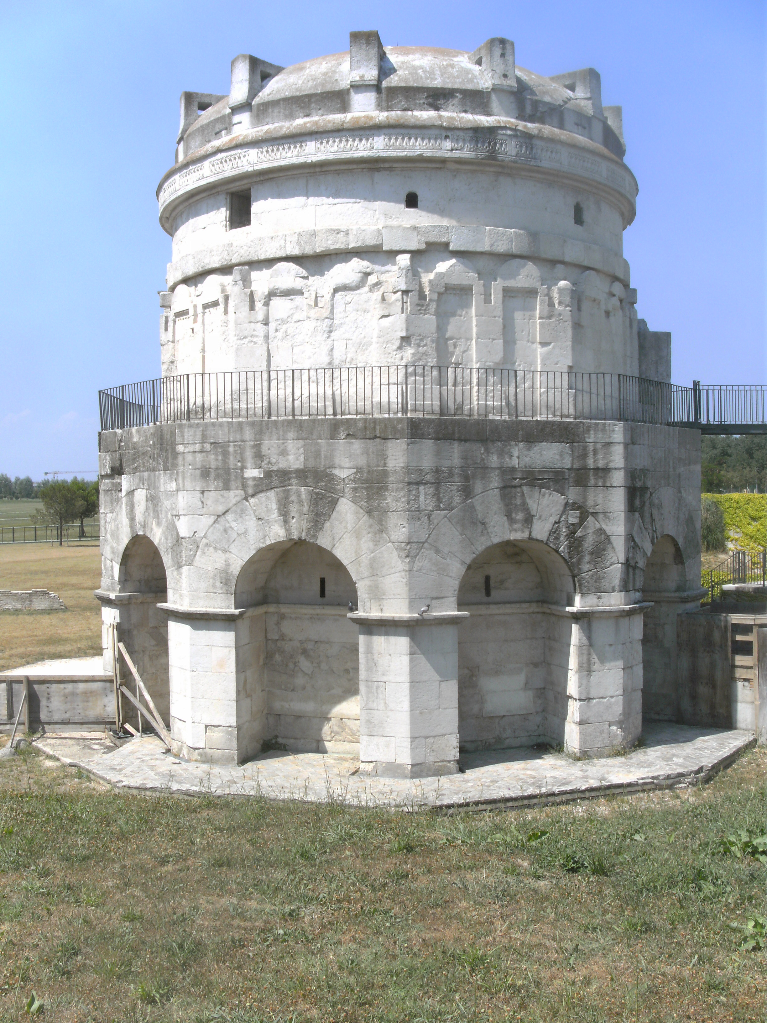 Ravenna, Mausoleum des Theoderich aus südlicher Richtung gesehen